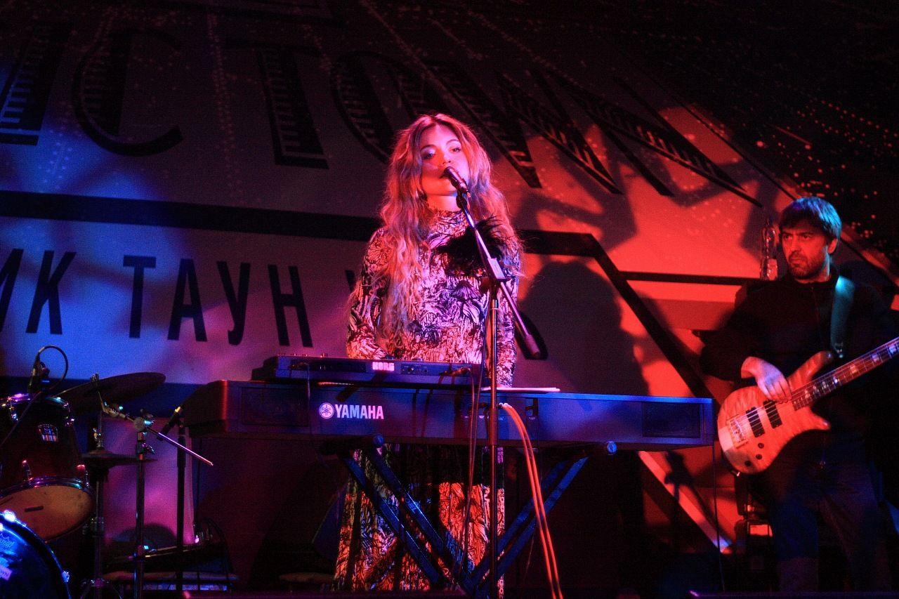 Презентация альбома "12 отличий" в клубе "Мюзик Таун"